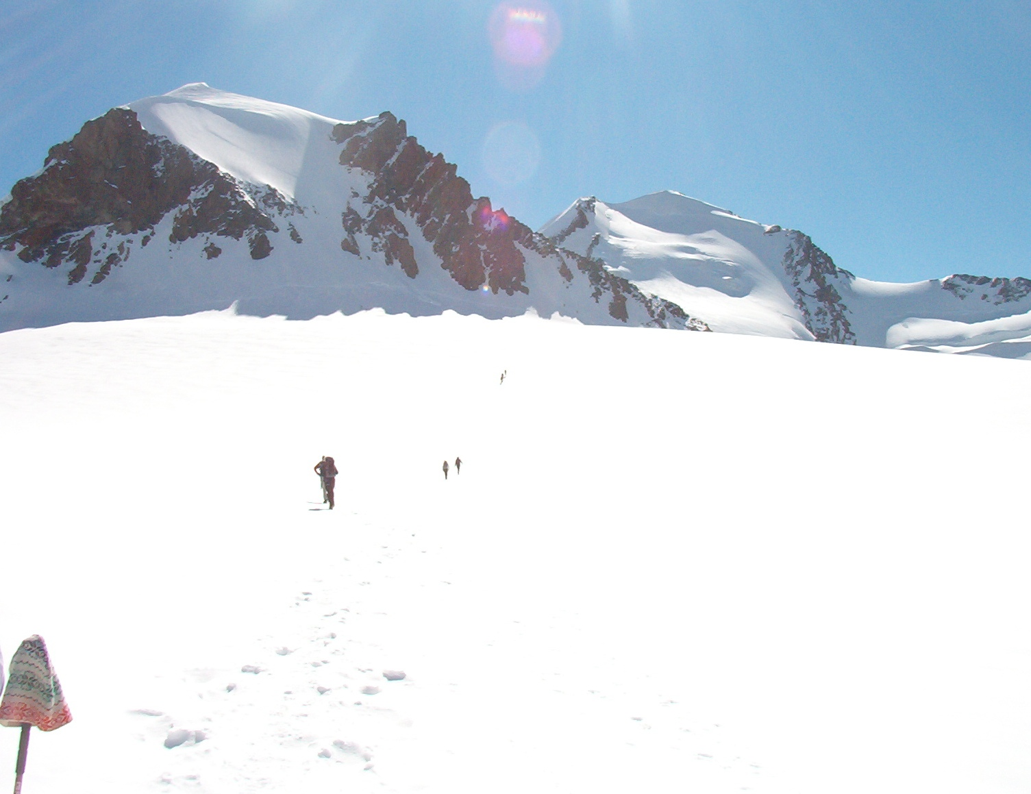 Grande Ghiacciaio di Verra - Val d'Ayas - Valle d'Aosta - Italy